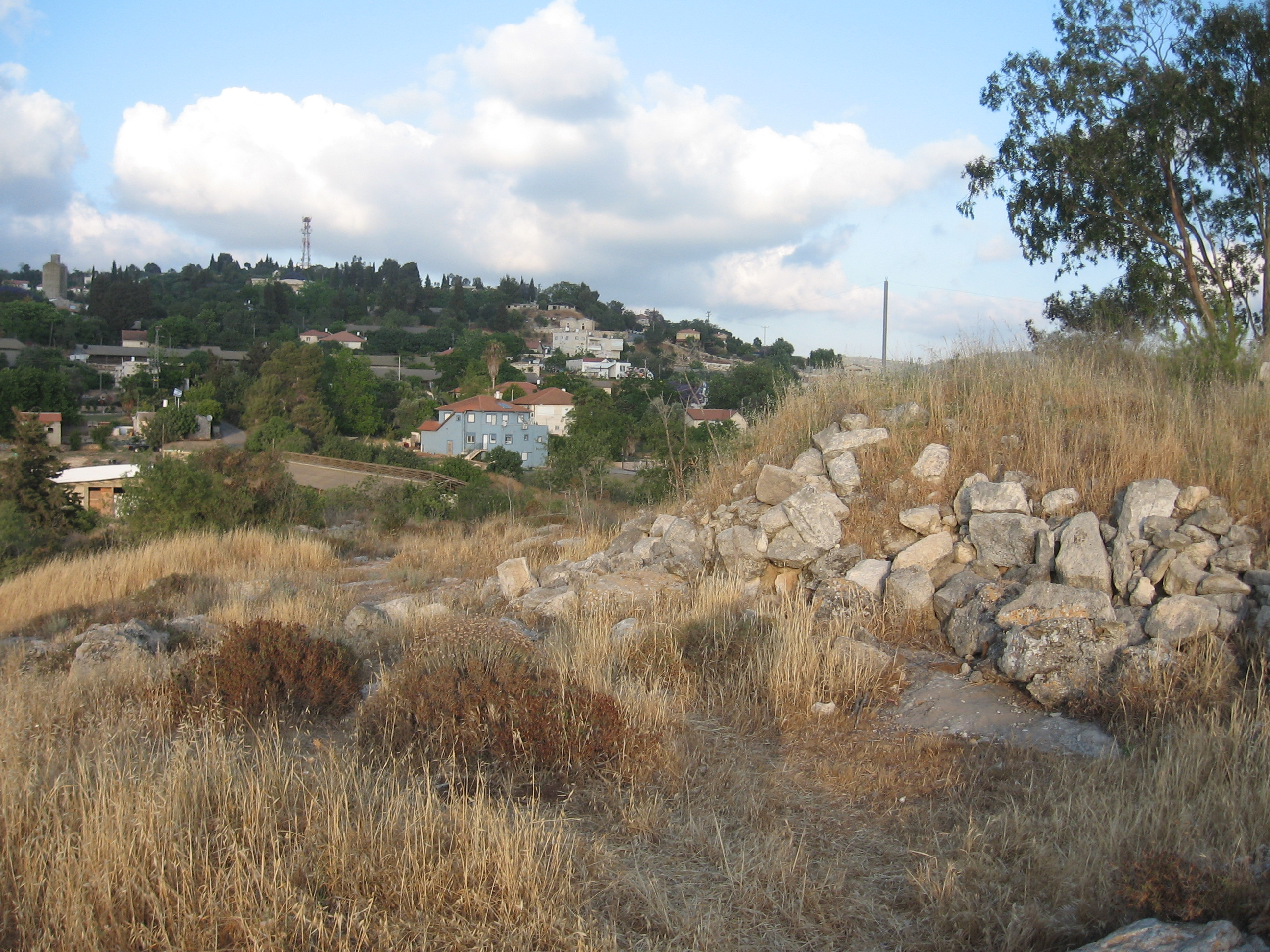 panorama Beth Meir